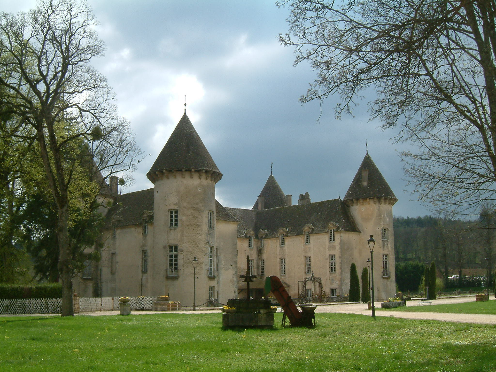 Château de Savigny-lès-Beaune, Bourgogne, FRANCE